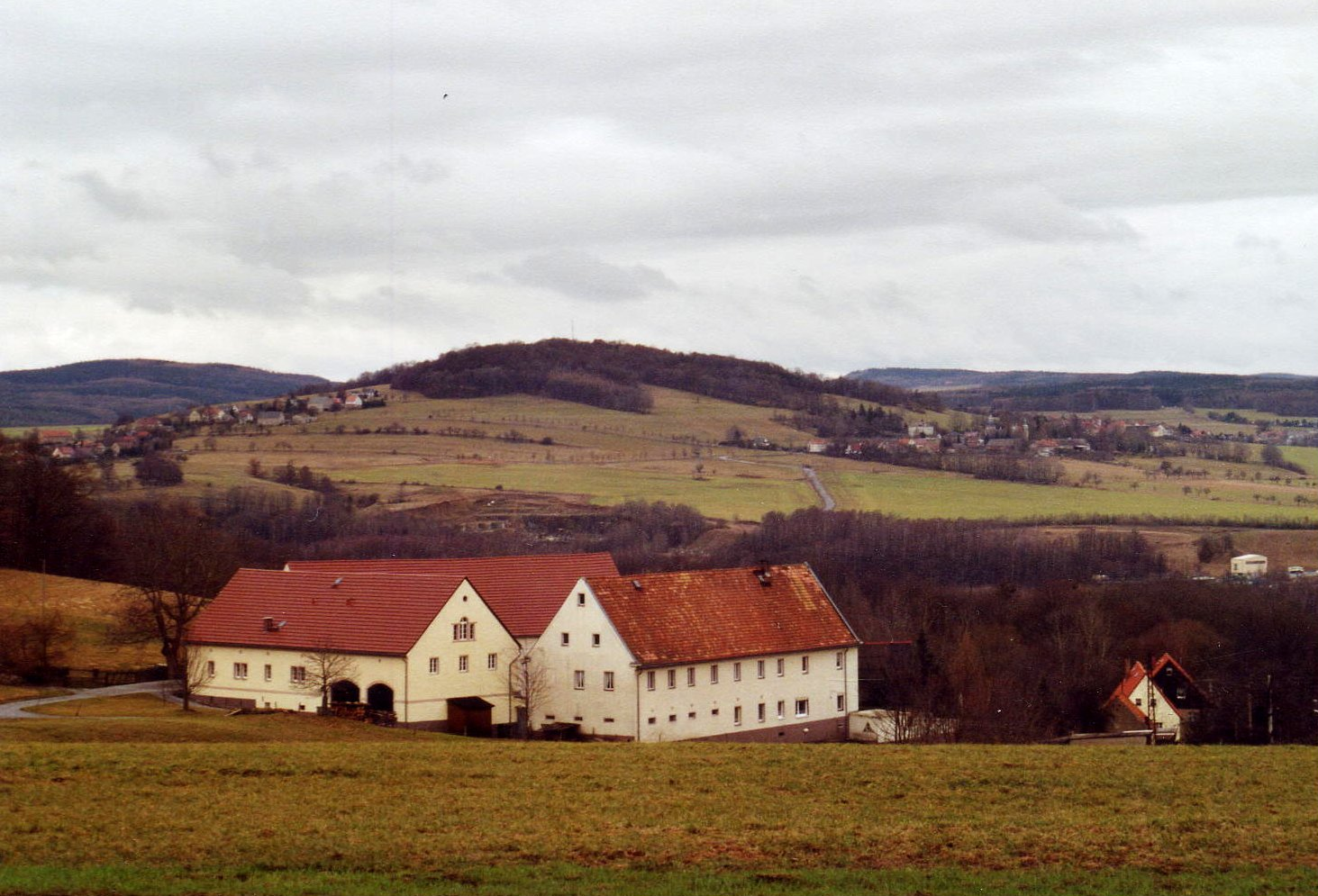 Blick von Nordosten auf den Cottaer Spitzberg (390,8 m)